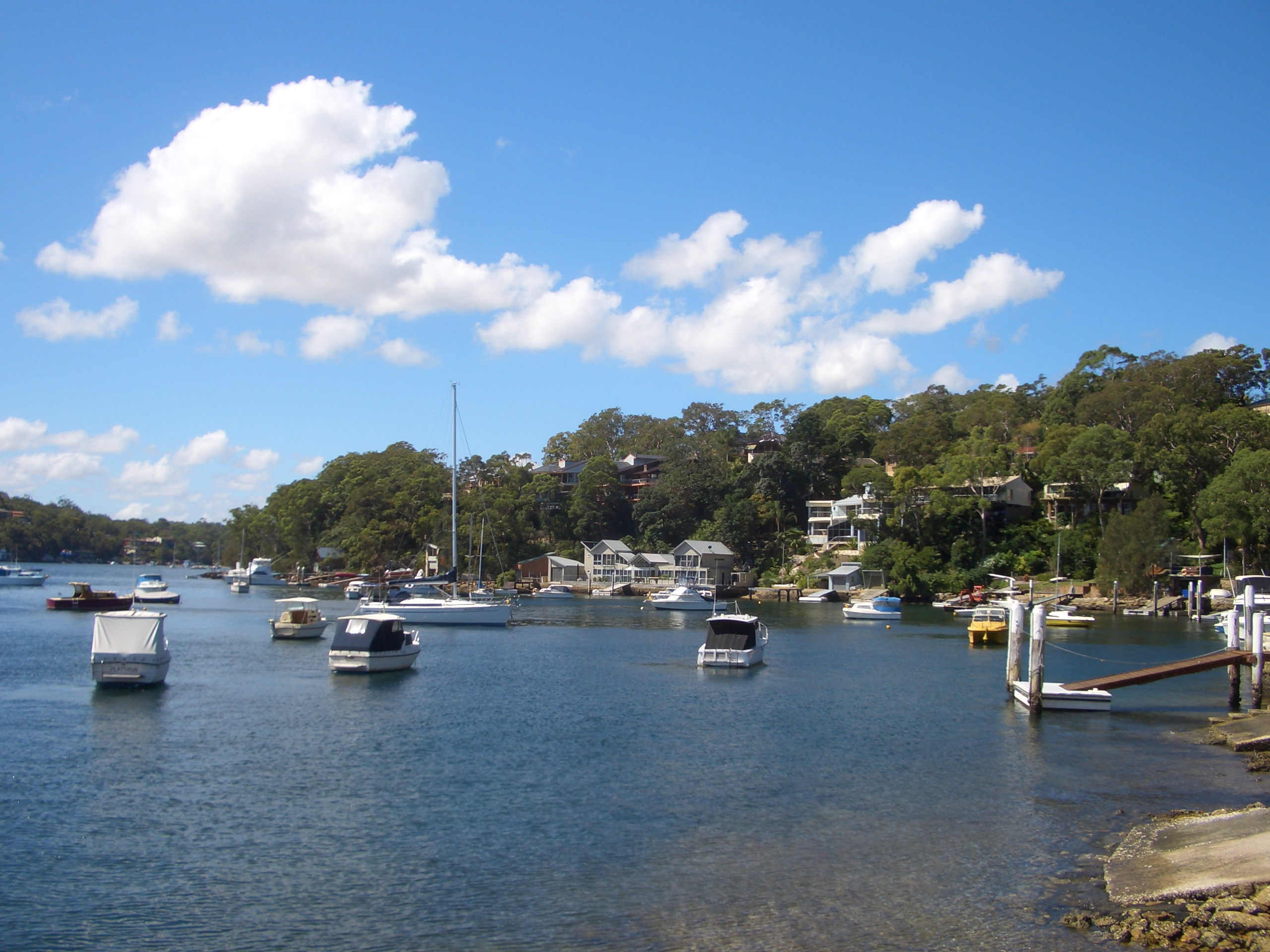 Lilli Pilli